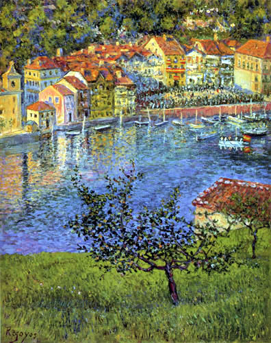 Stierkampf in der Stadt